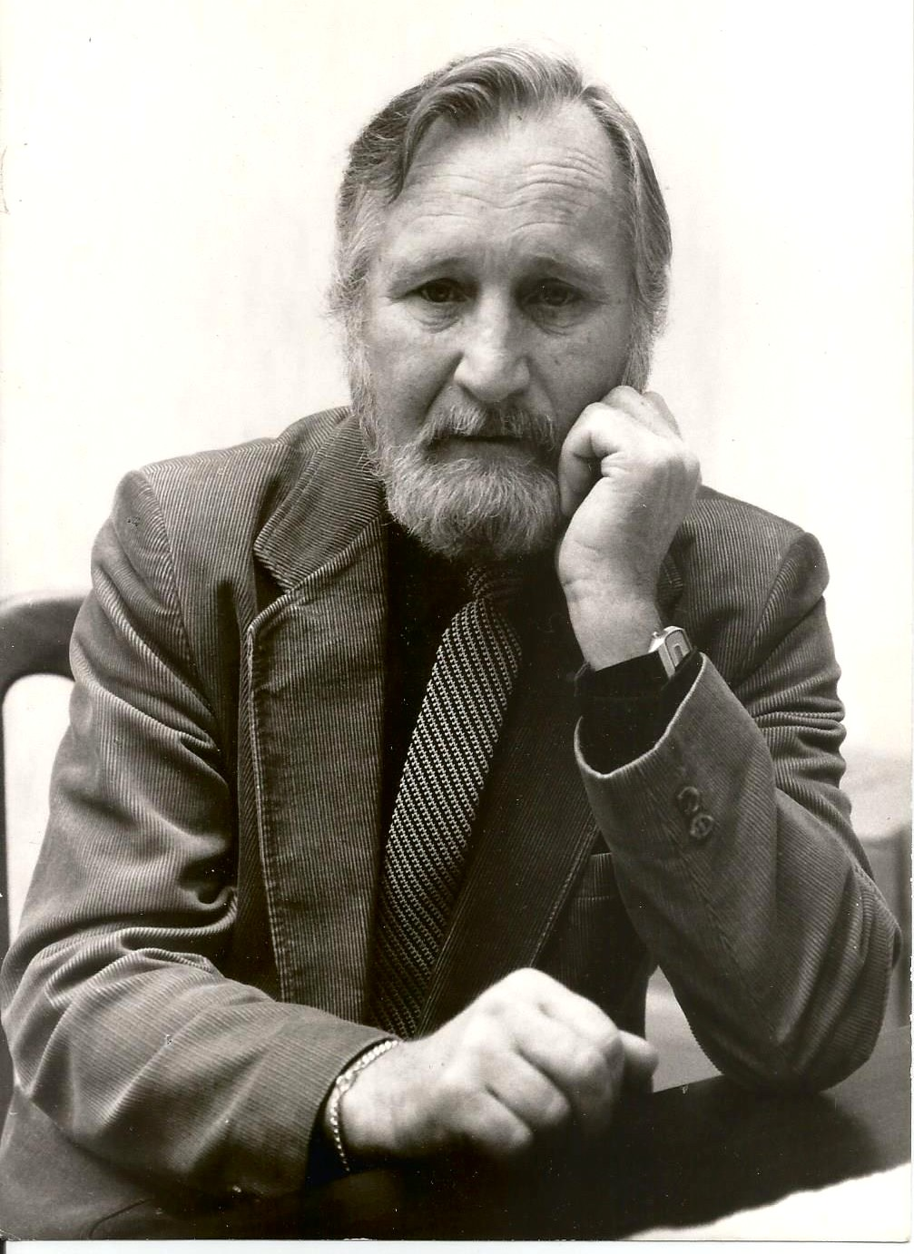 Pintér Tamás író, újságíró az 1990-es évek elején